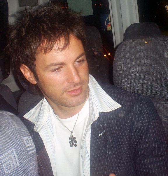 Axel Patricio Fernando Witteveen PardoPaparazeo casual :o